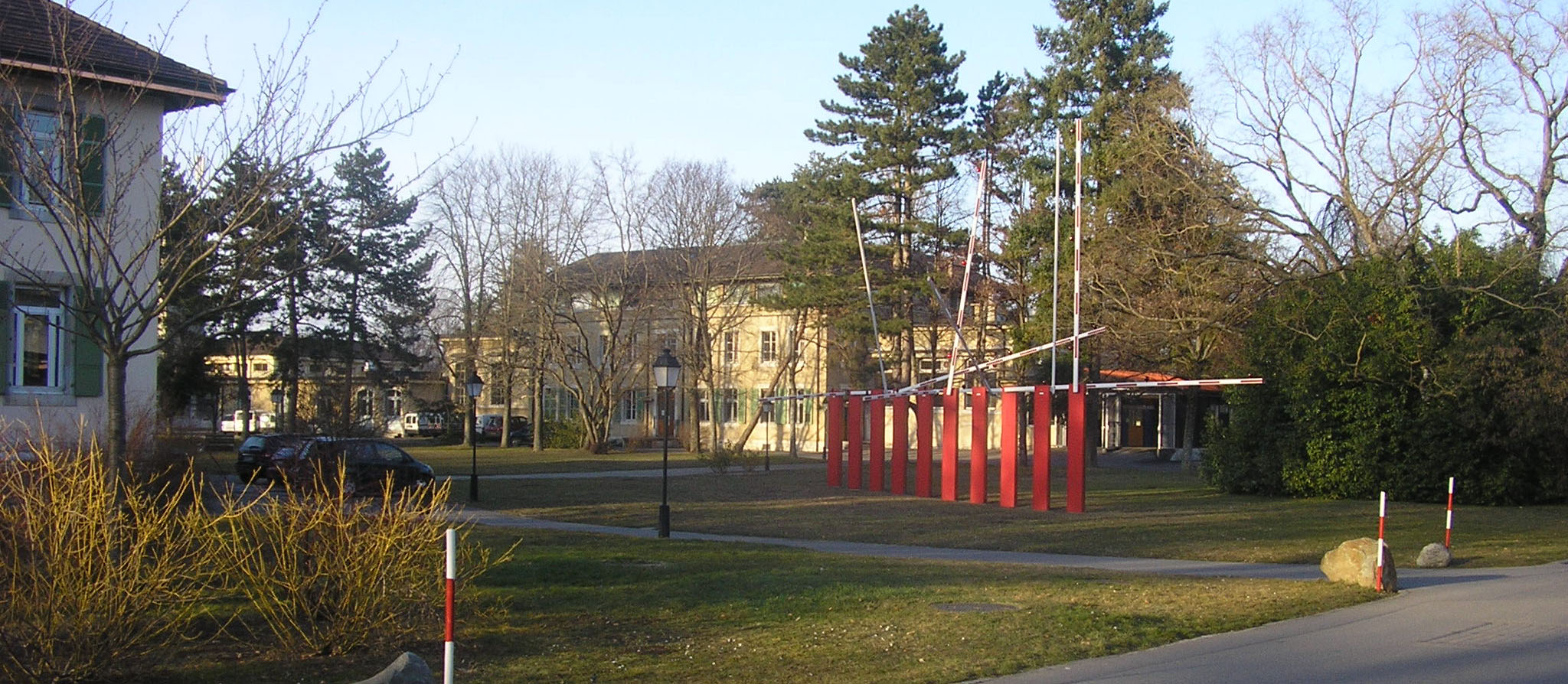 Panorama d'une partie de la clinique de Belle-Idée à Genève, avec une œuvre d'art d'Anne Blanchet, « Passage 2000 ».